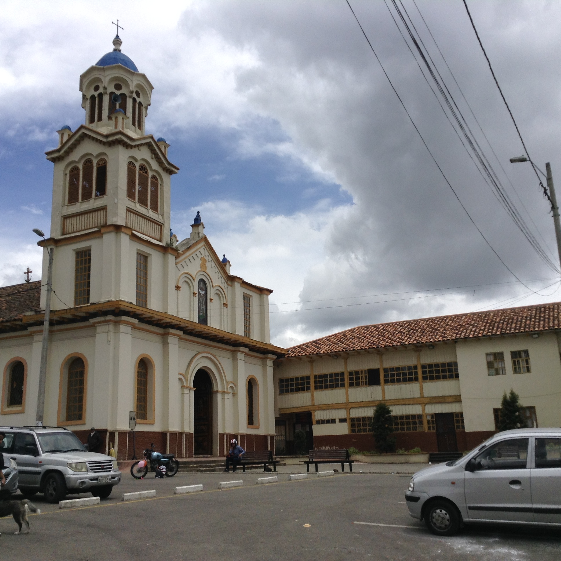 Iglesia parroquial de Sayausí